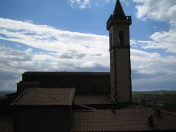 Vinci